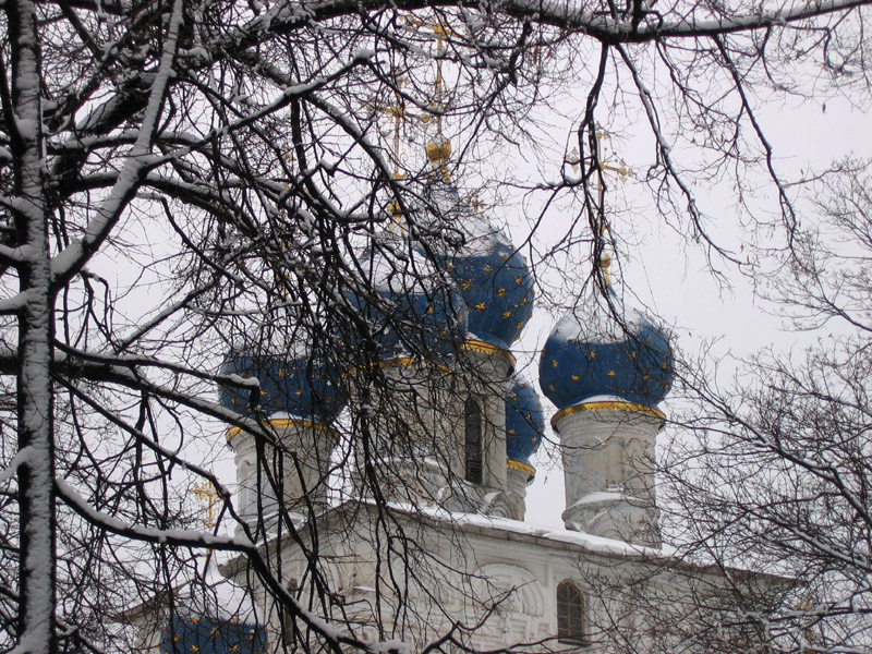 Kolomenskoe.Tserkov Kazanskoi Bogomateri (Kerk van Onze Lieve Vrouwe van Kazan)